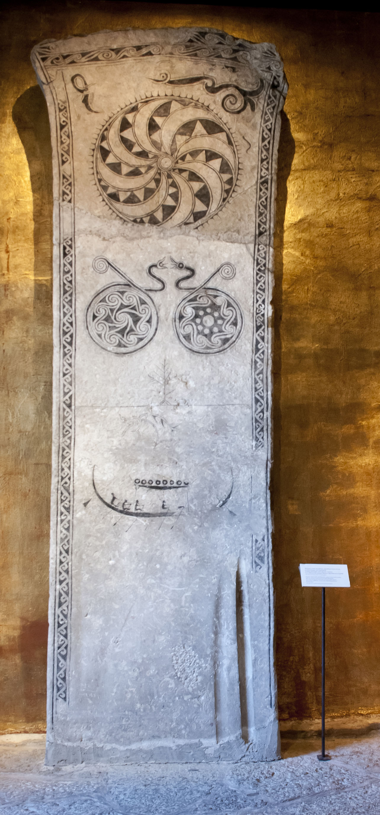 Bildsten med sliprännor utställd i Fornsalen, Visby